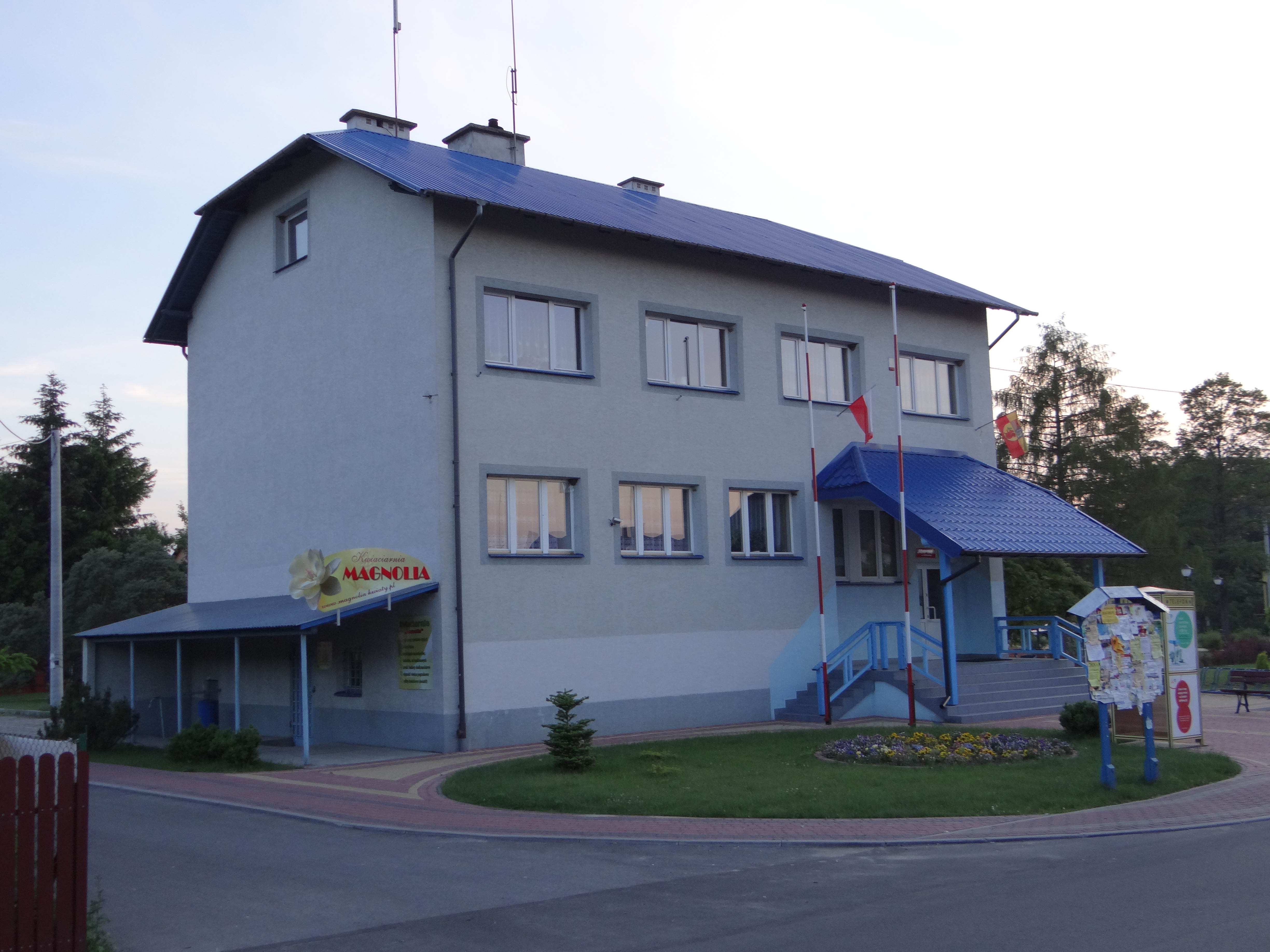 Zdjęcie wykonane w miejscowości Jarocin, powiat niżański.